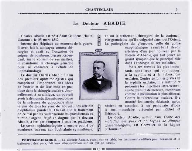 Le Docteur Abadie Revue : Chanteclair, 9e année Edition : Romainville : Carnine Lefrancq, 1914